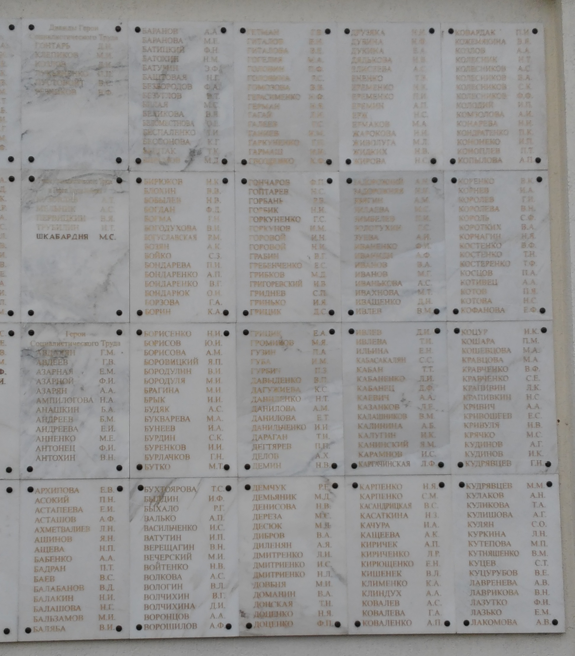 Мемориальная_доска_с_именами_Героев_Социалистического_Труда_Кубани_и_Адыгеи._(левая)Краснодар_2017